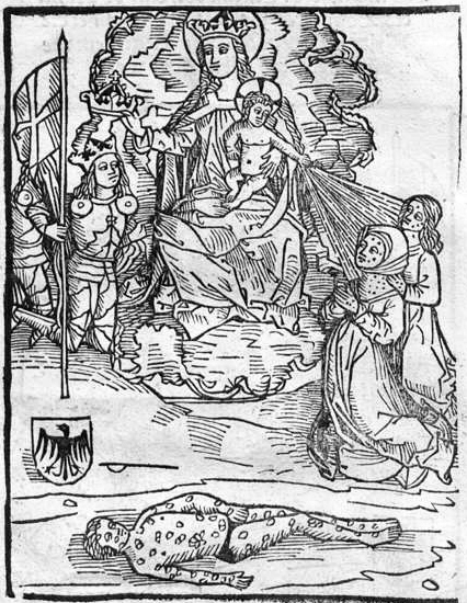 Titelbild des Buches